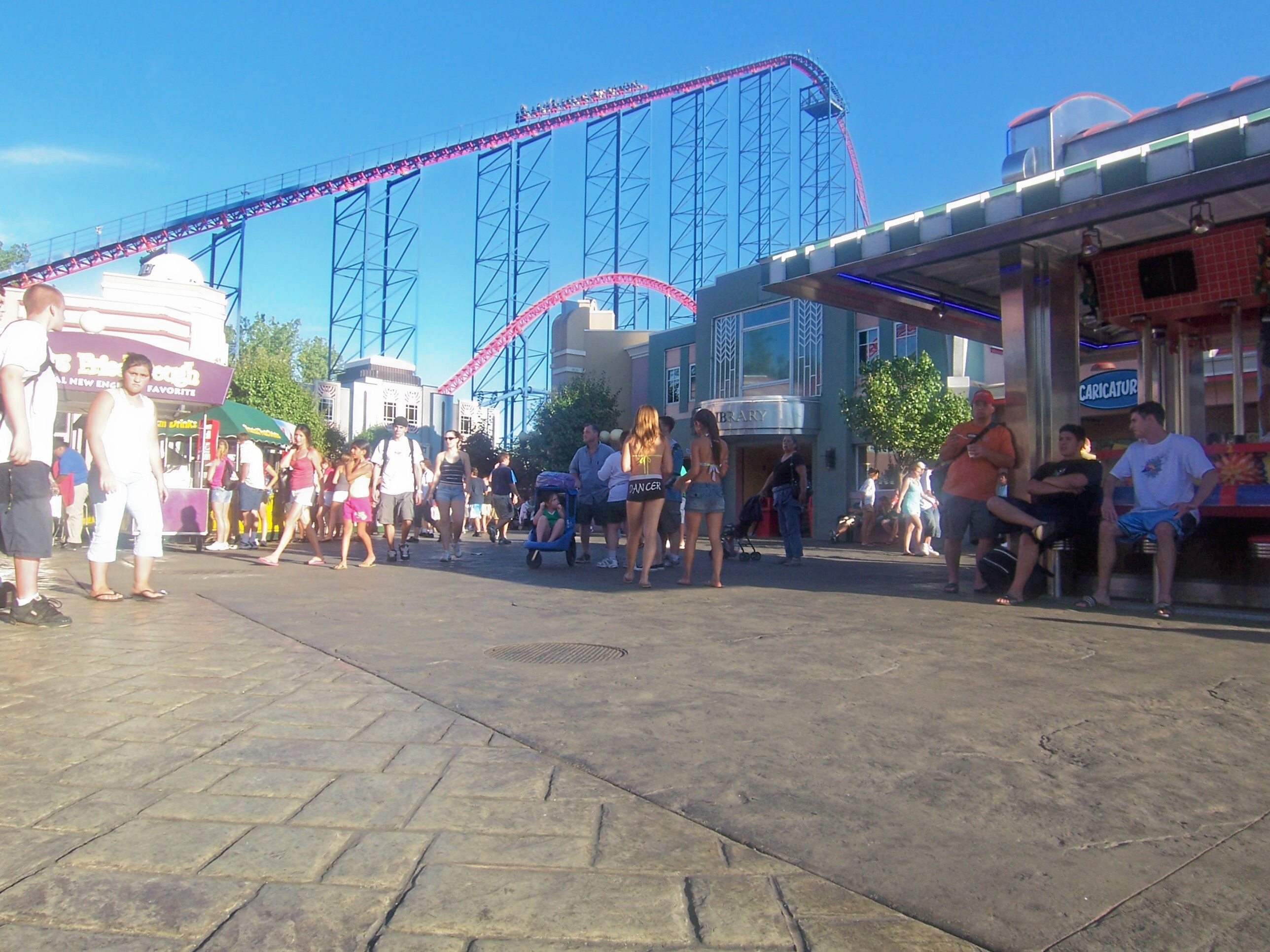 Superman - Ride Of Steel , montagnes russes à Six Flags New England